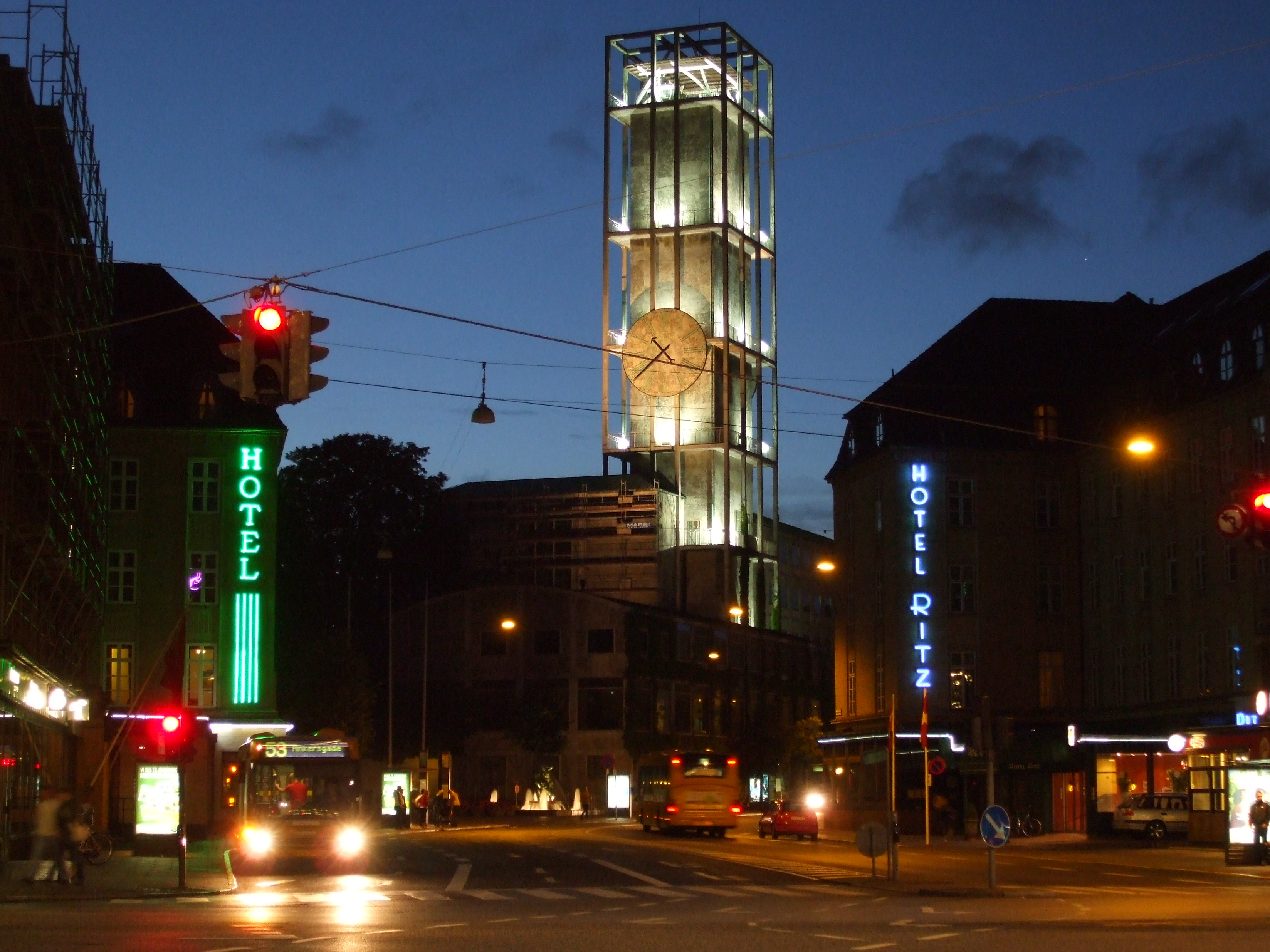 Park allle i Århus by night med Århus Rådhus i baggrunden..